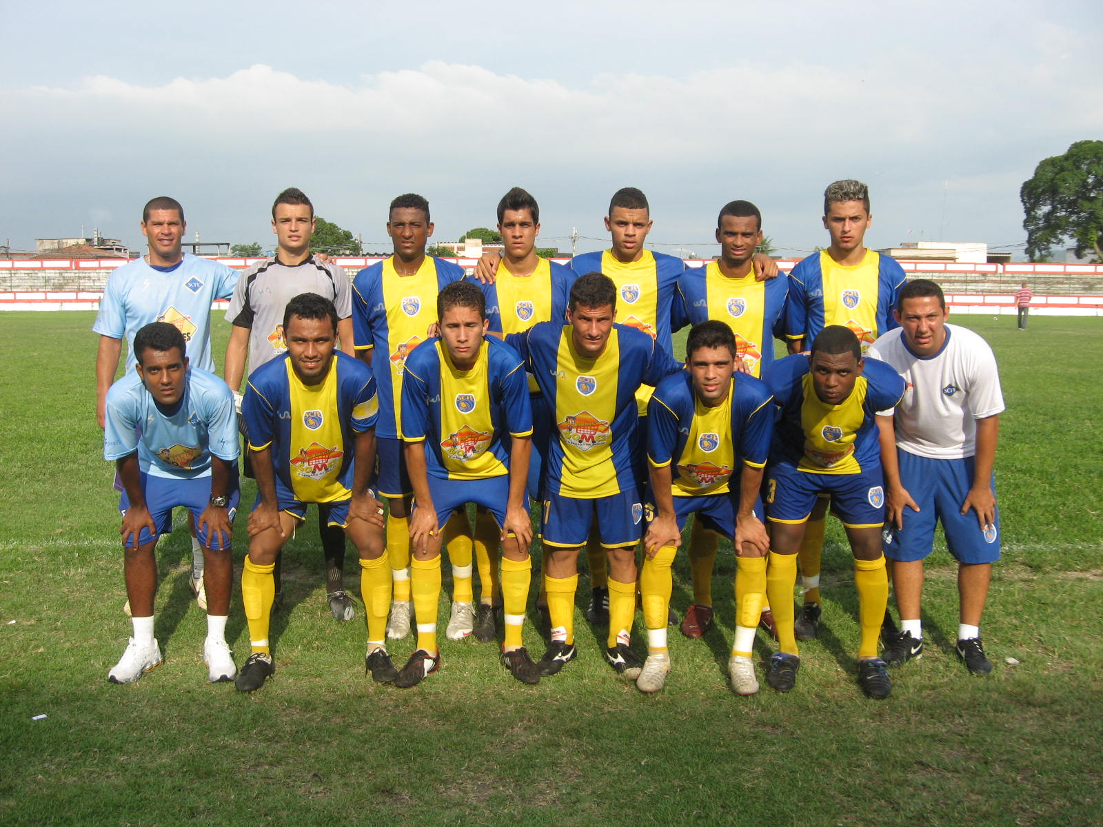 Formação profissional do Sampaio Corrêa Futebol e Esporte, de Saquarema, estado do Rio de Janeiro, Brasil.